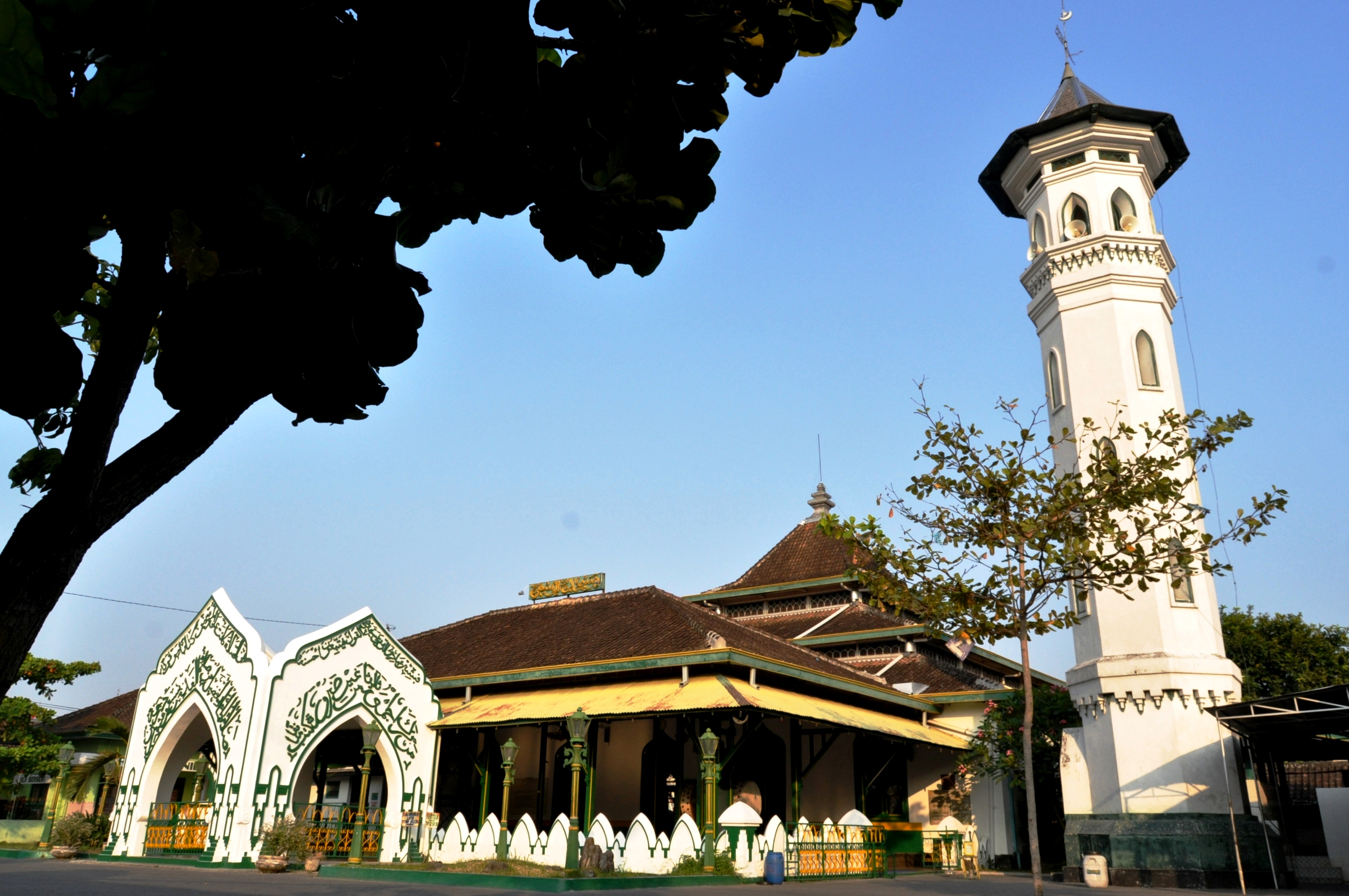 Masjid Wustho Mangkunegaran dari sisi timurlaut, memperlihatkan gapura (kiri) dan menara azan (kanan)